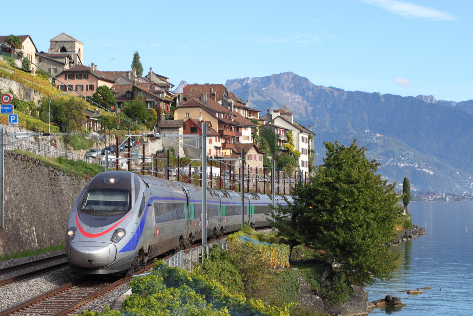 Rame ETR 610 005 des CFF en route de Milano à Genève comme EC 34 près de St-Saphorin sur le Lac Léman.